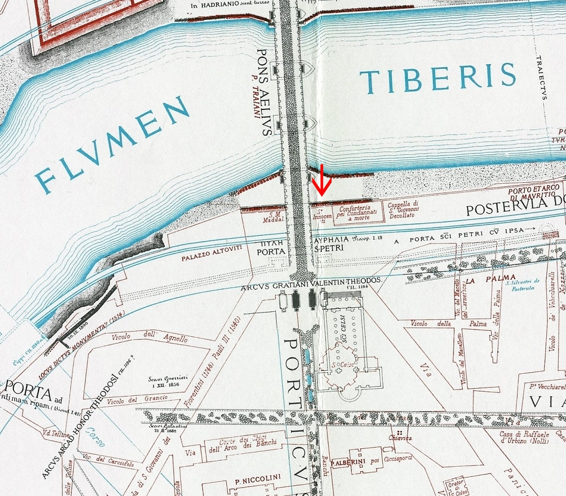 Pianta di Lanciani